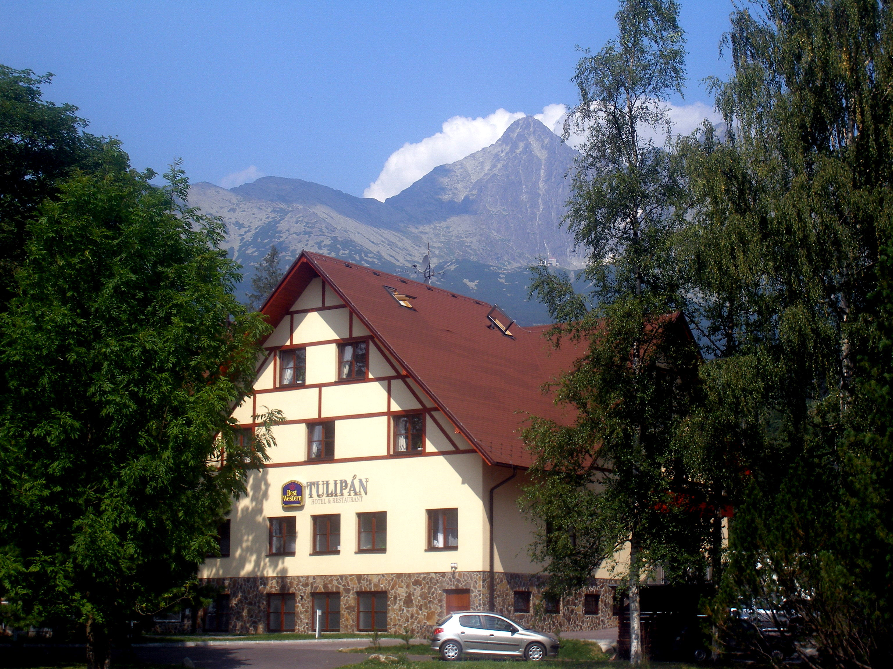 Osada Tatranská Lomnica, hotel Tulipán, mesto Vysoké Tatry.